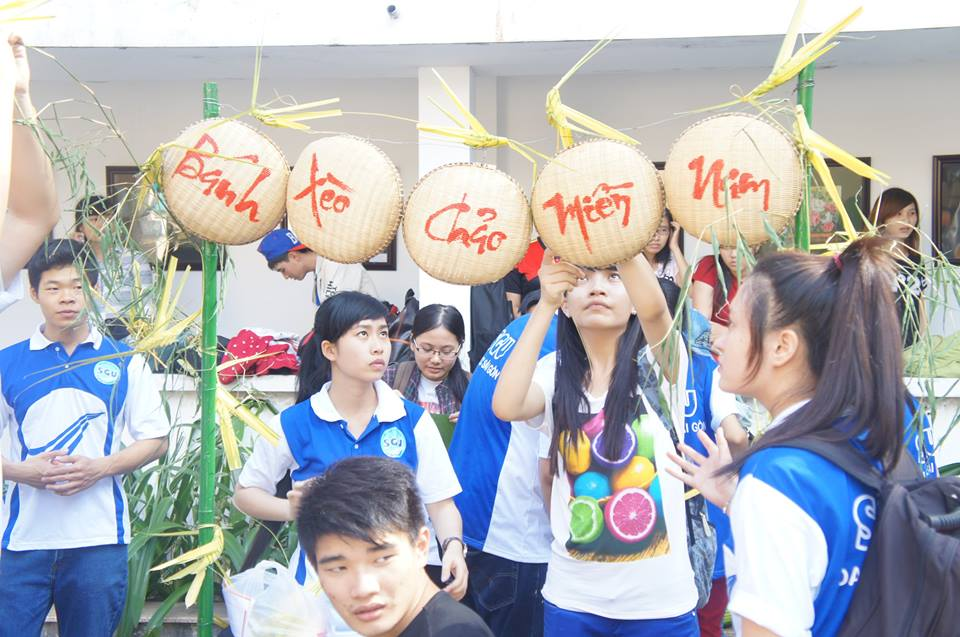 Sinh viên Đại học Sài Gòn trong ngày hội Ẩm thực